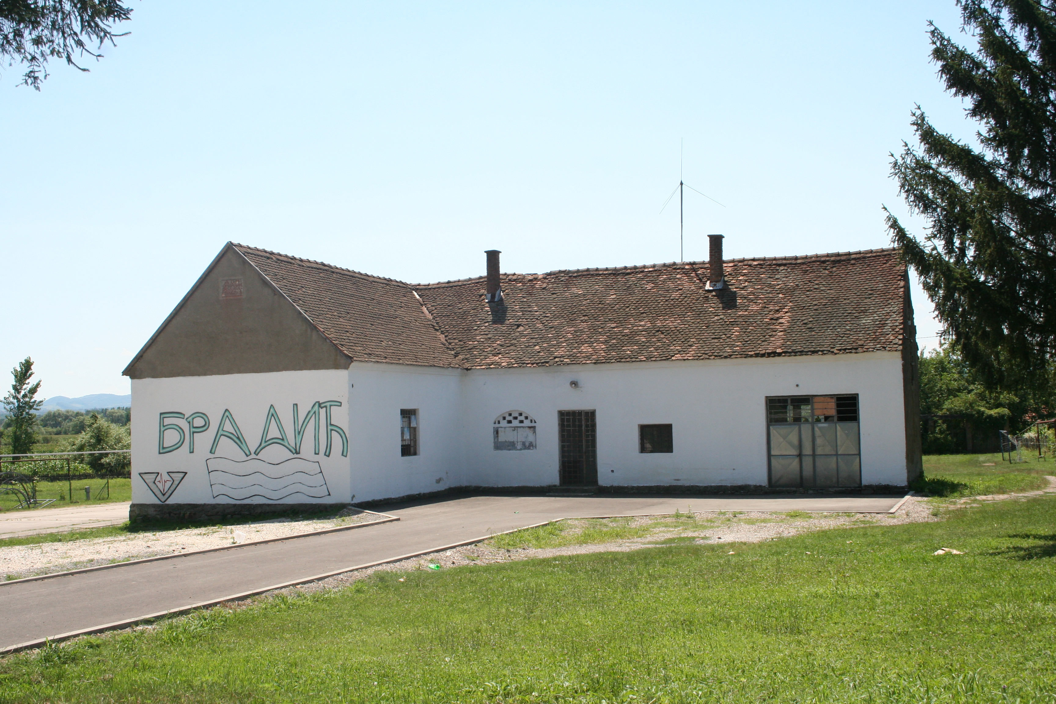 Zgrada MZ, Bradić